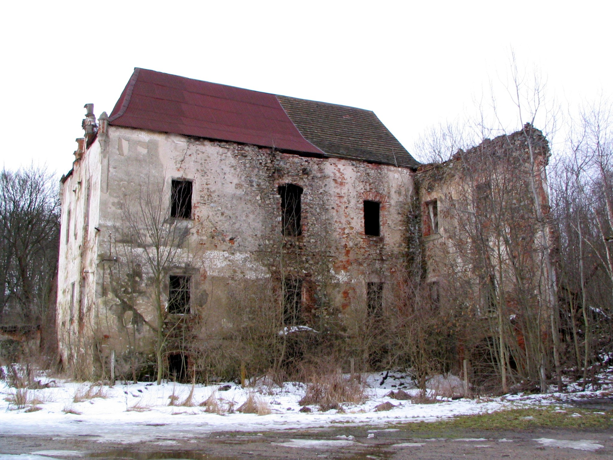 Zámek Zvěstov, Zvěstov 1, Zvěstov.